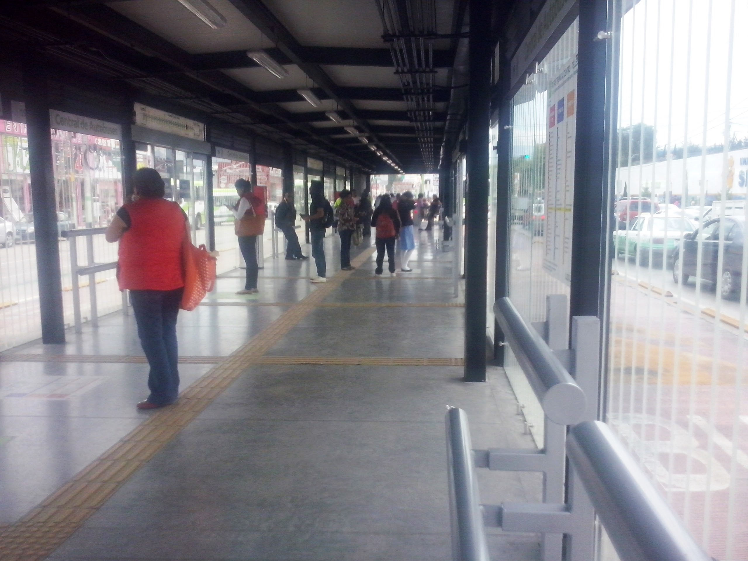 Estación Central de Autobuses del Tuzobus en Pachuca de Soto